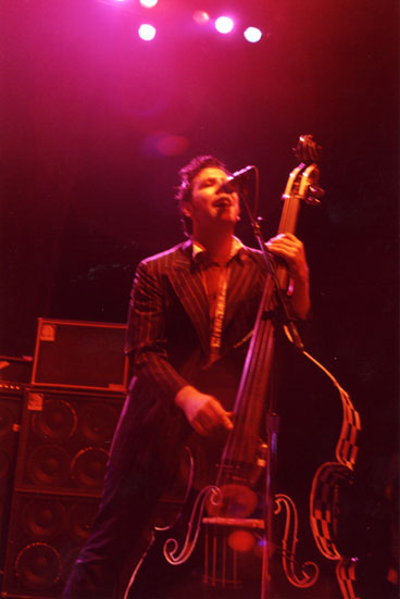 Scott Owen